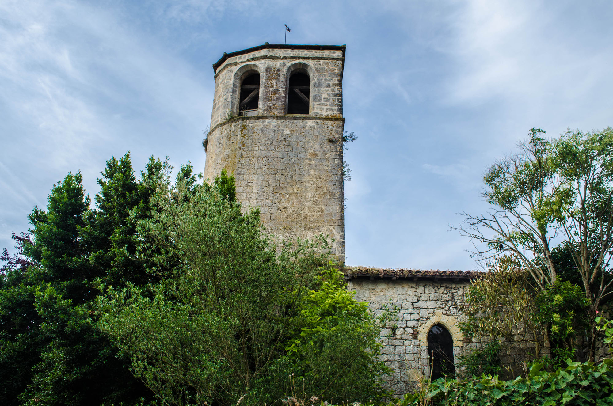 Vieille église de Saint-Clar (Gers, France), le clocher (XIe s.)